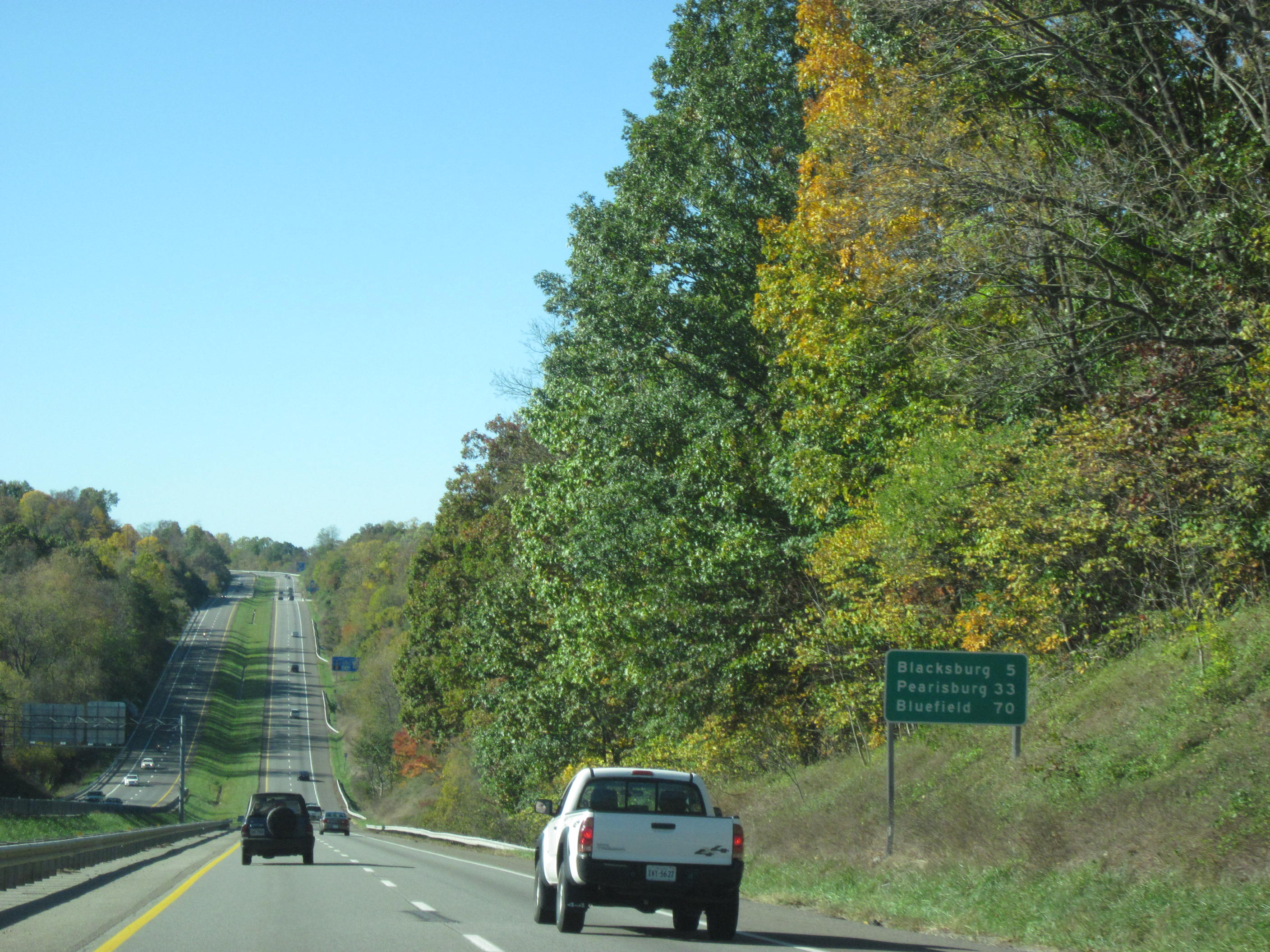 US Route 460 - Virginia